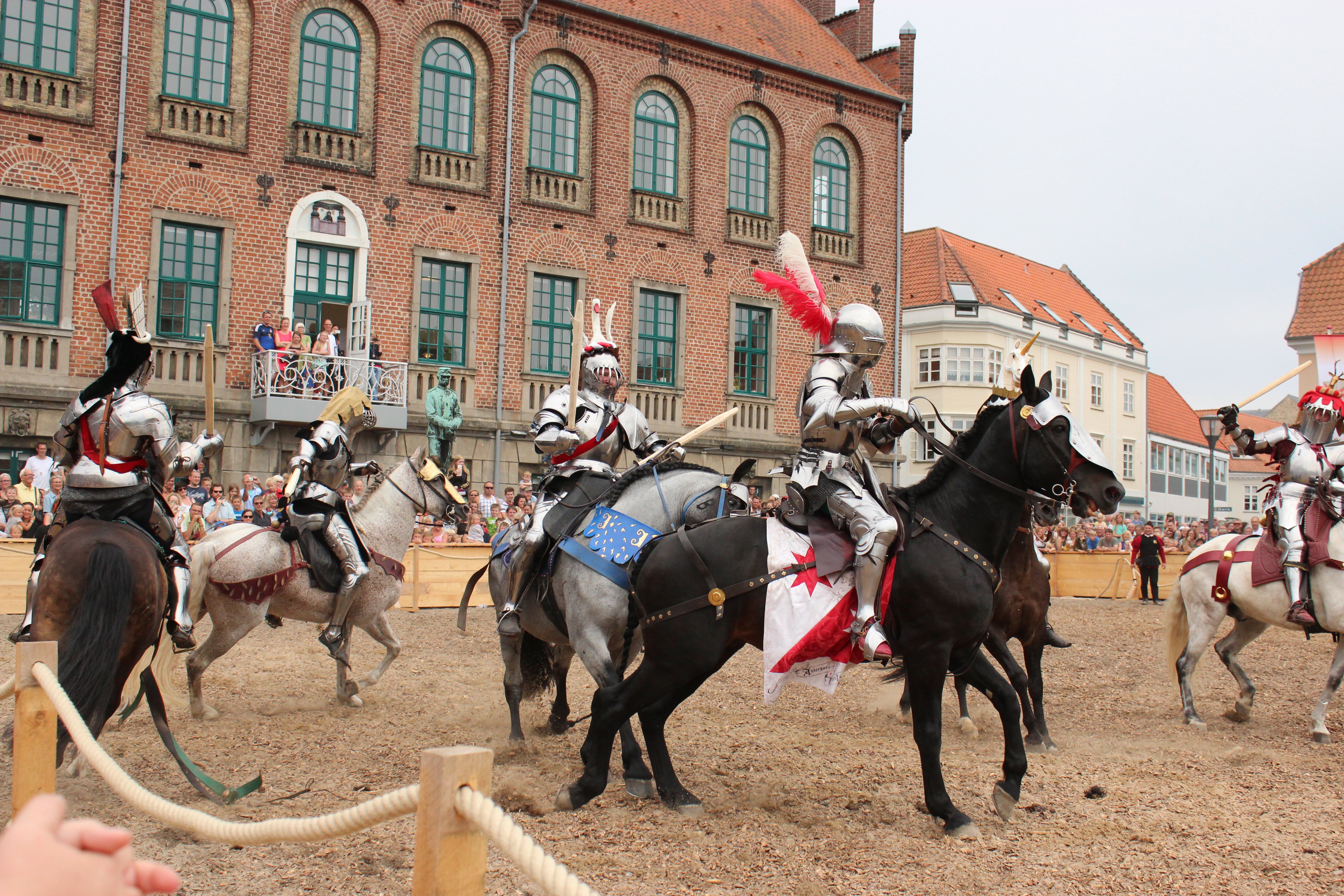 Tournament in 2014